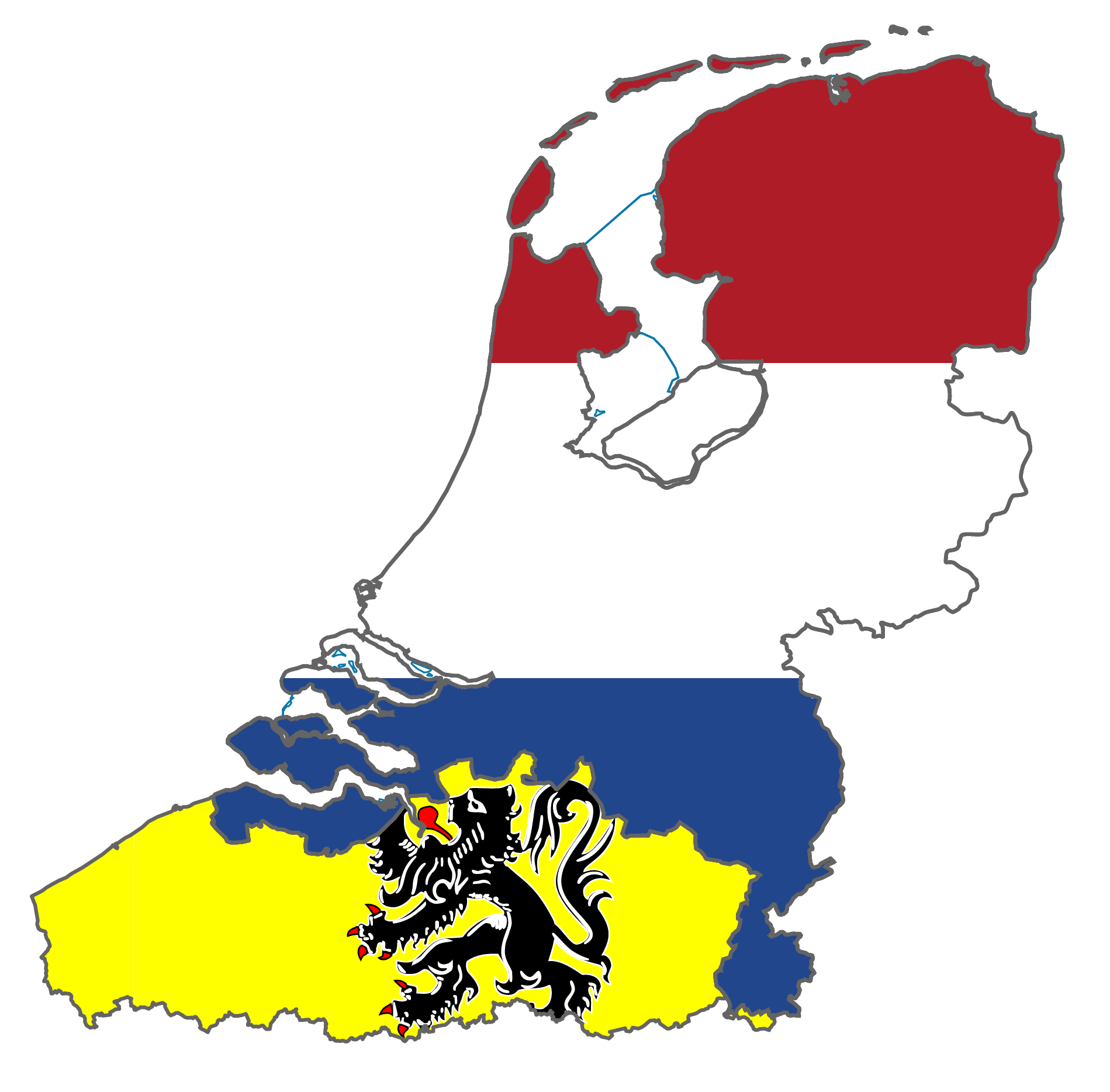 Nizozesko a Vlámsko. Zřejmě separatistická kresba